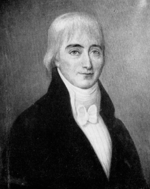 François de Lyrot de La Patouillère (1723-1793)